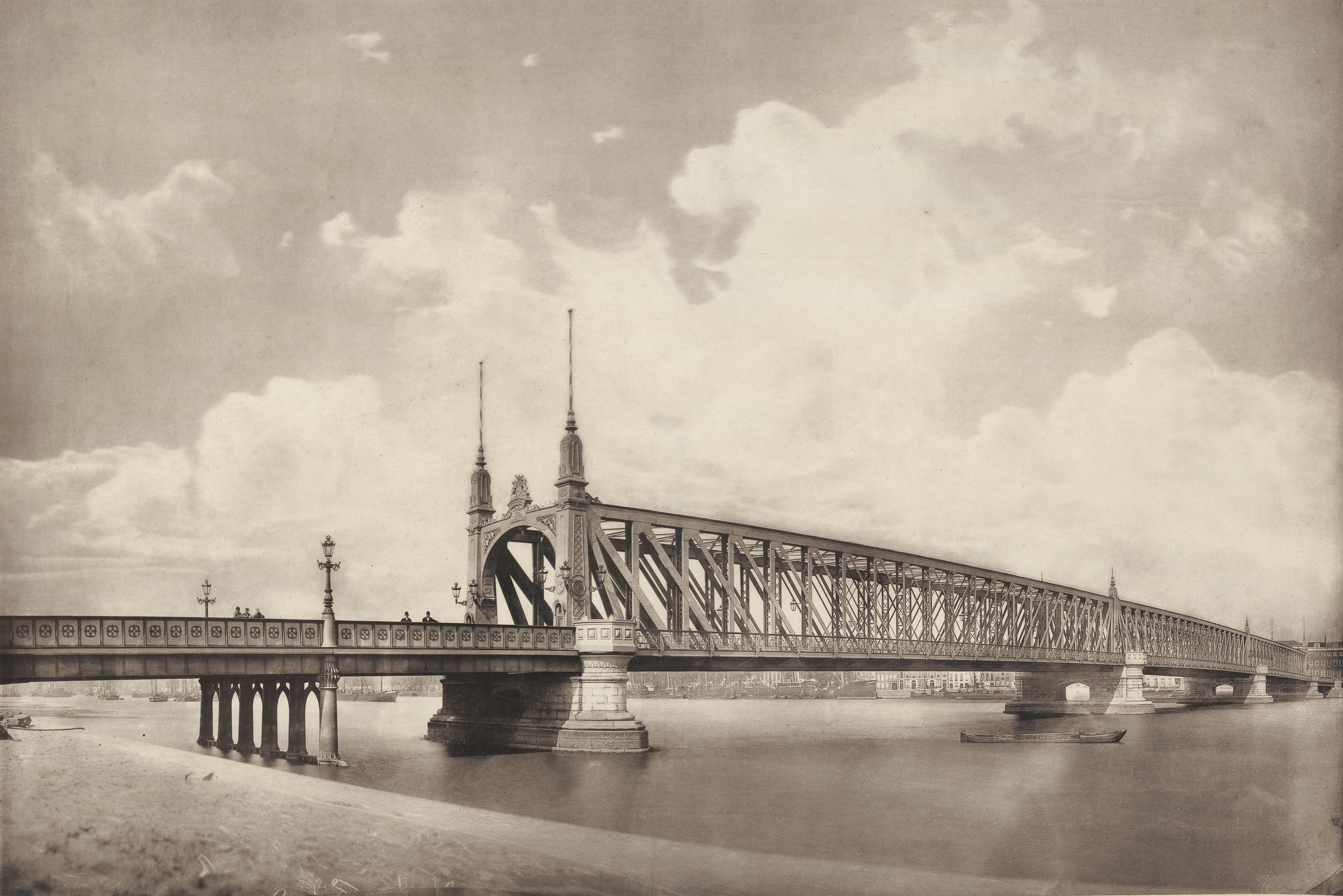 Willemsbrug kort na opening gezien vanaf het Noordereiland, foto van J.G. Hameter (1838-1885)